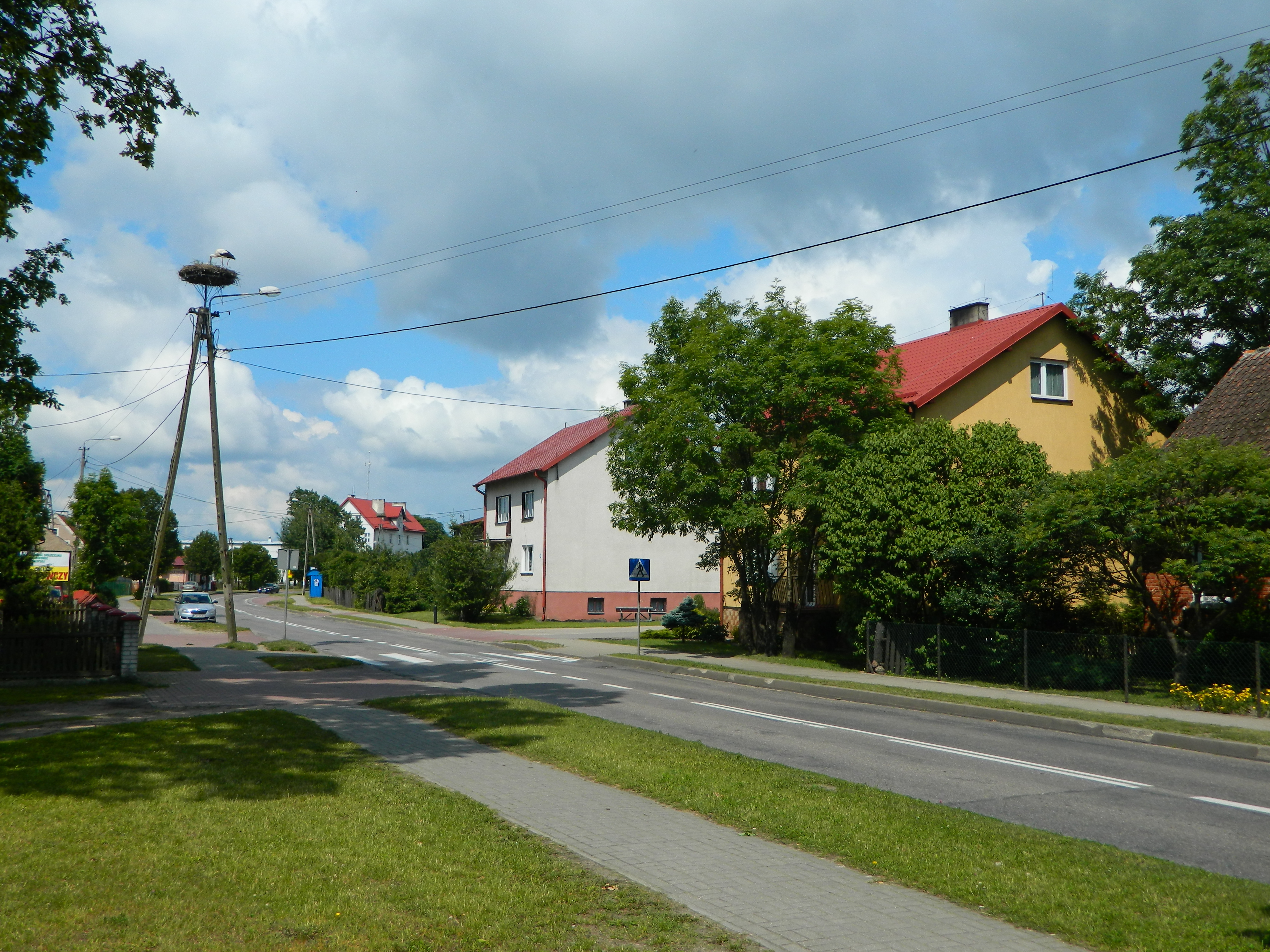 Bocianie gniazdo, Olszyny, w pobliżu remizy strażackiej przy DK53